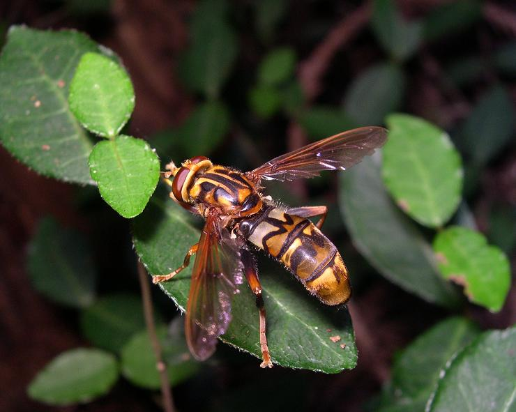 Milesia undulata, una mosca de las flores de las que se mimetizan con las avispas